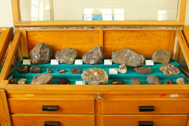 سنگ